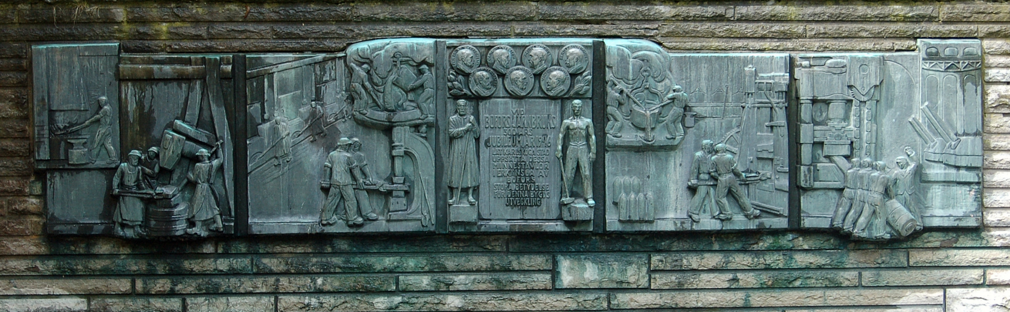 Bronsreliefen Boforsmomomentet från 1949 av konstnären John Lundqvist placerad utanför Karlskoga Konsthall